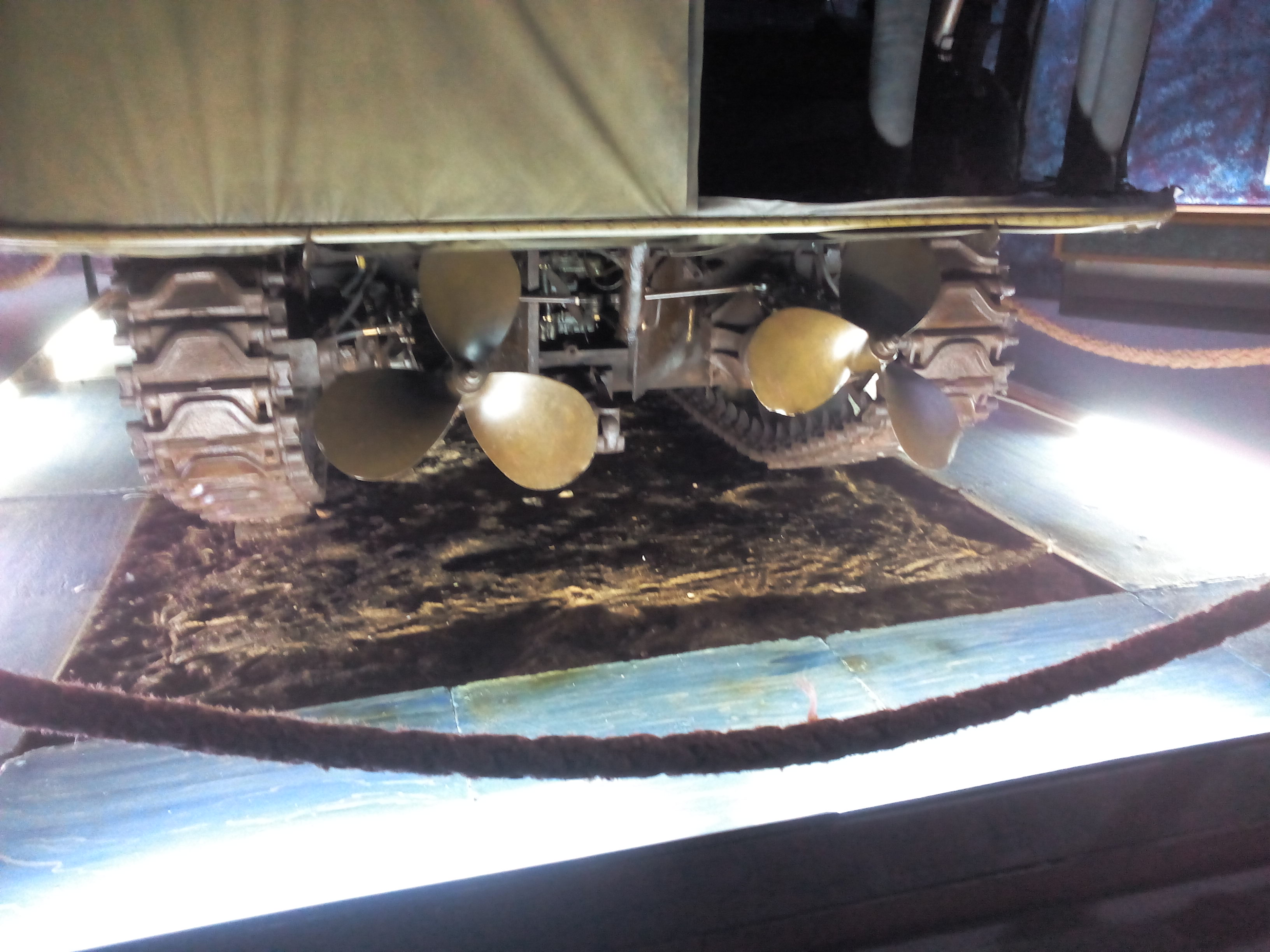 5 giugno 2018 Visita allo Sherman DD Padiglione "Da el Alamein a Messina e Salerno"